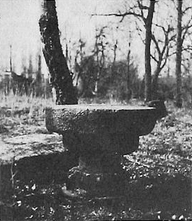 Беларуская (тарашкевіца): Магілёўцы (Mahiloŭcy), сядзіба Быхаўцаў (Bychaviec). Стол у парку